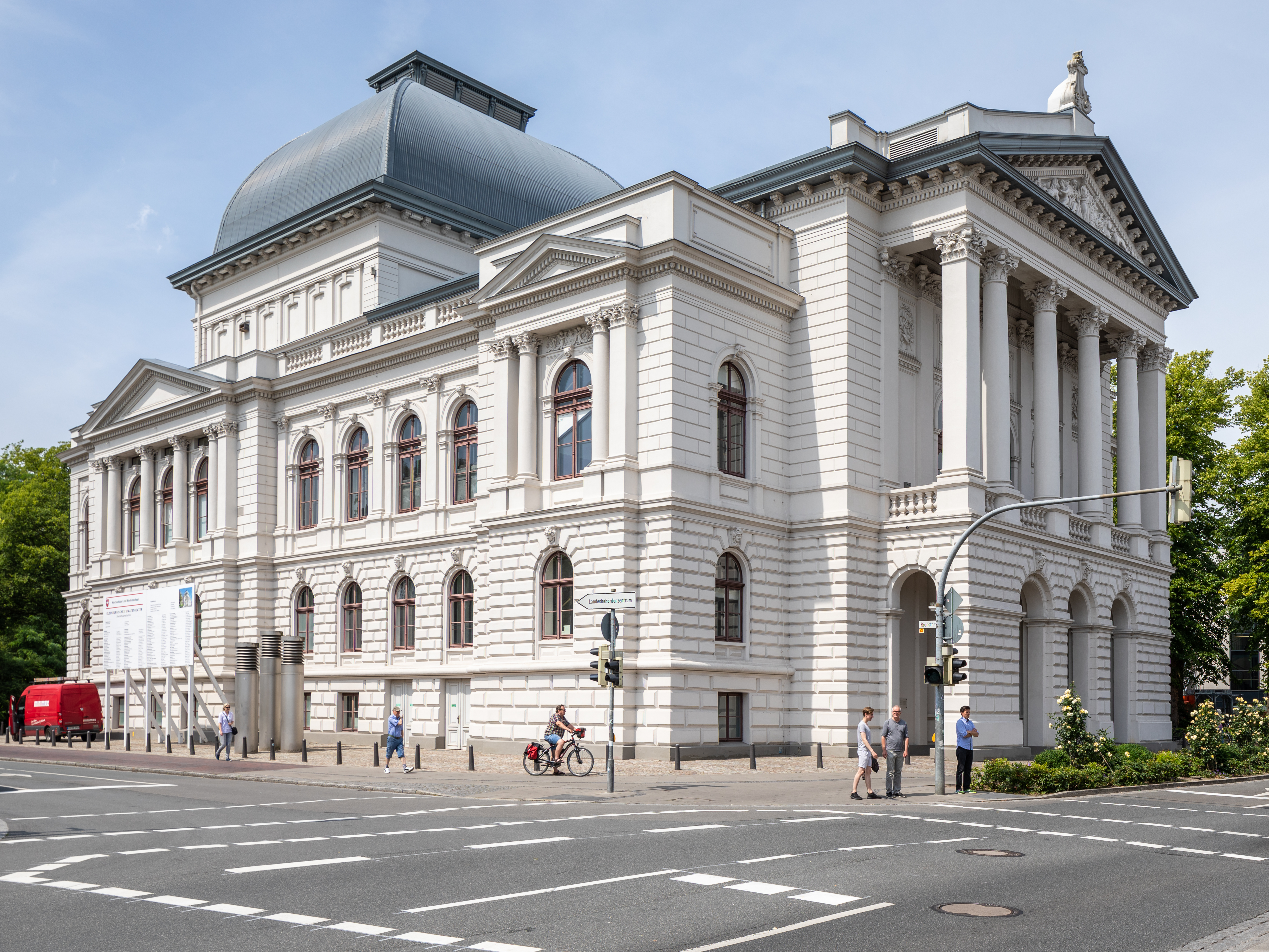 Staatstheater Oldenburg (Juni 2017)